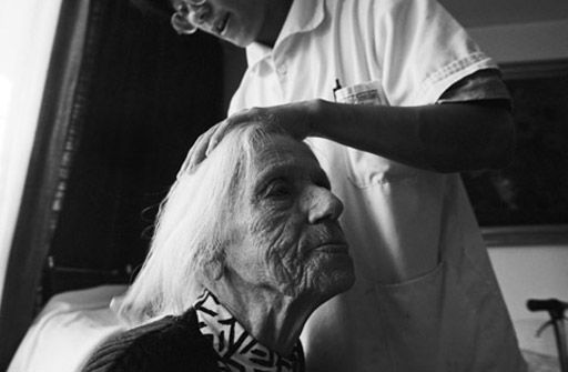 Altenpflege durchgeführt von einem Zivildienstleistenden in München